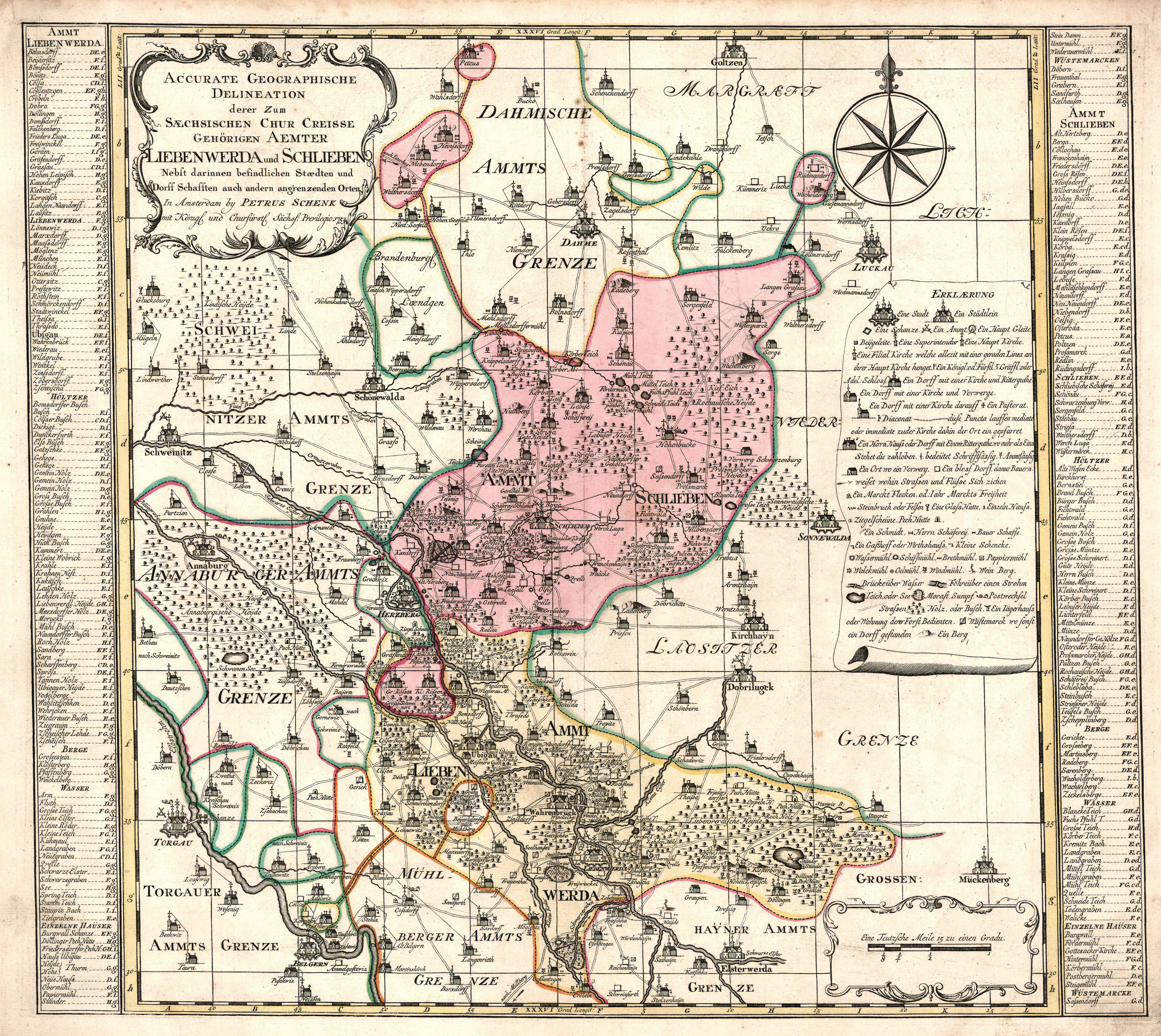 Die Ämter Liebenwerda und Schlieben im 18. Jahrhundert